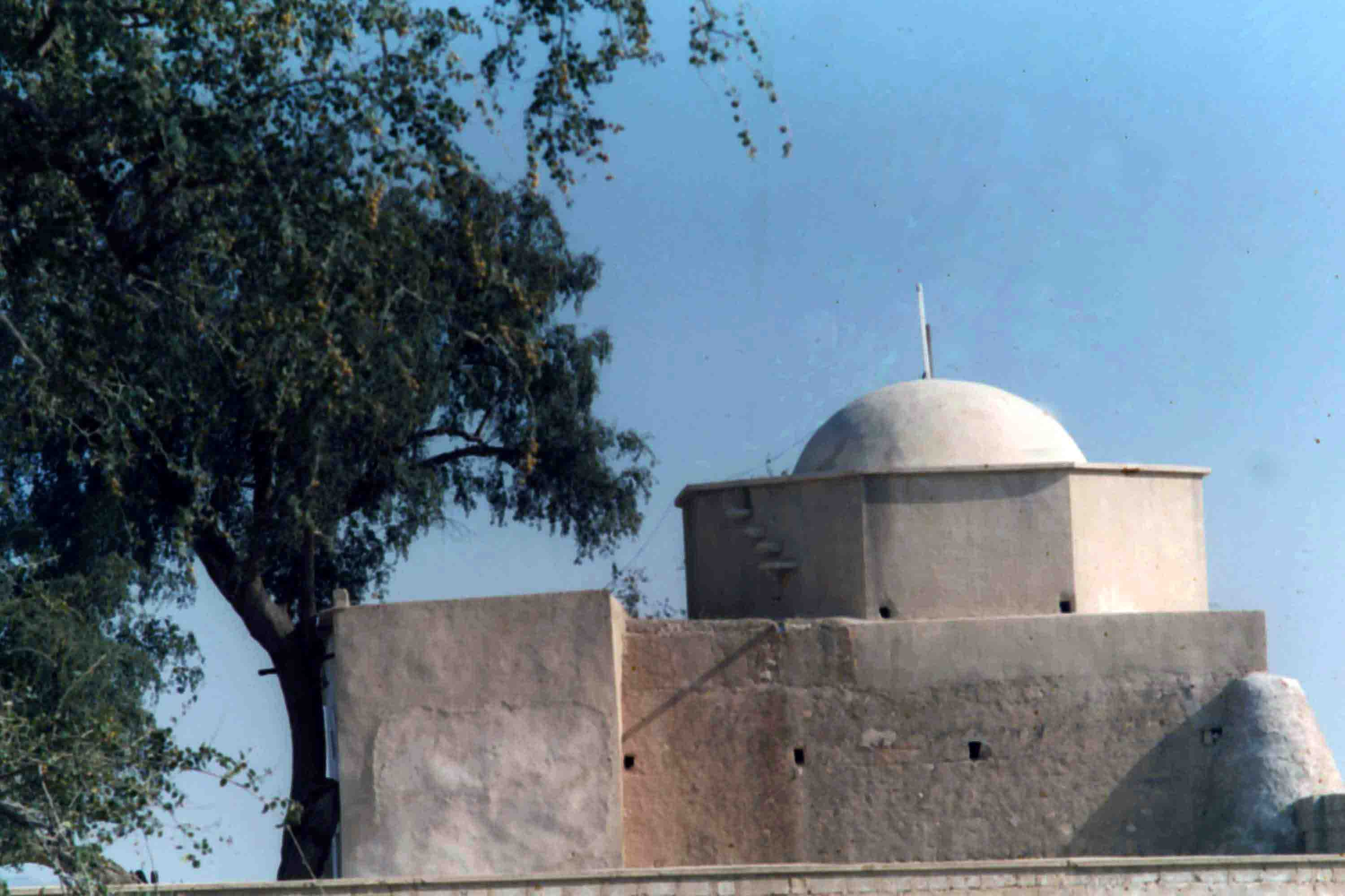 بقعه شاه منصور هاشمي